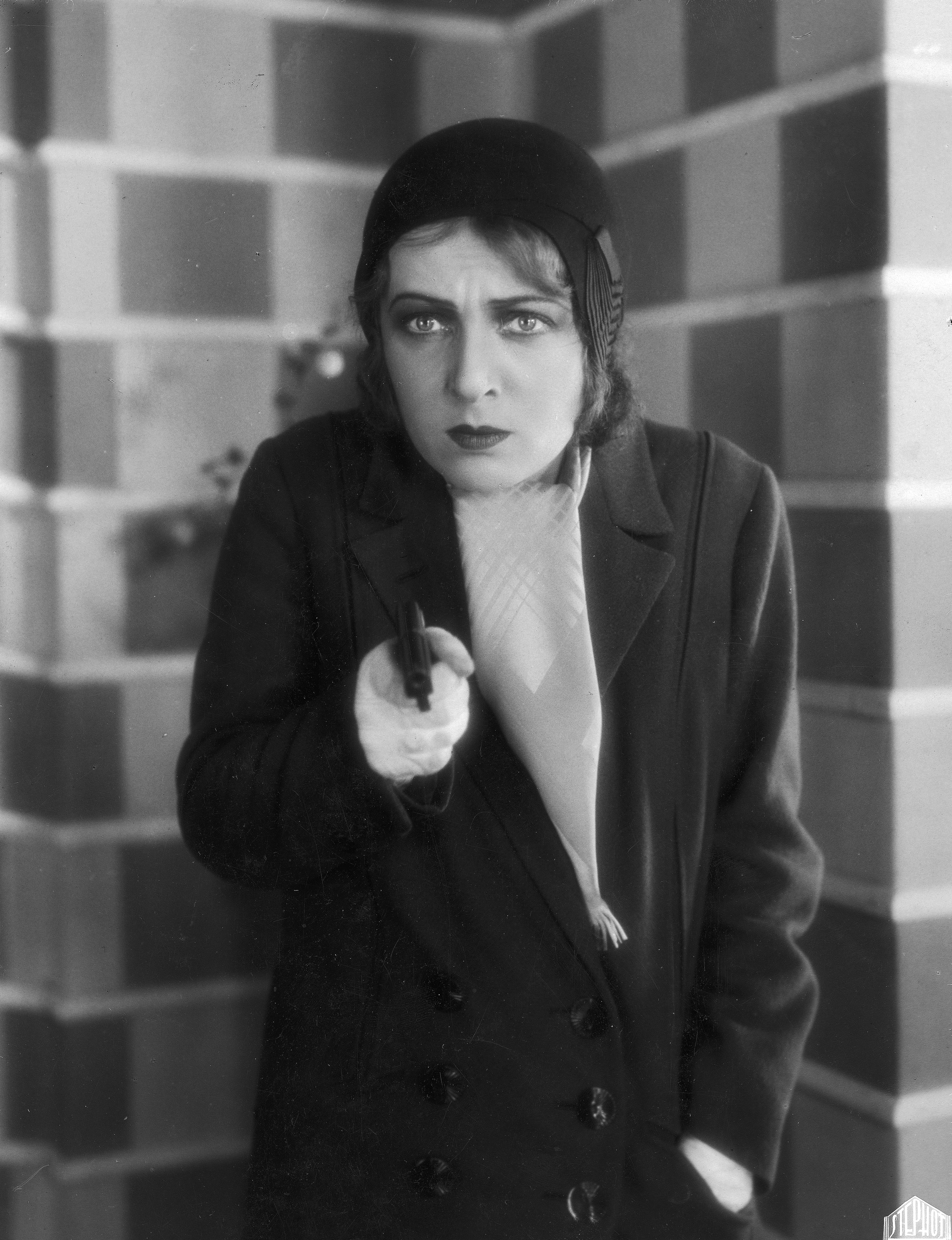 Aktorka Maria Malicka (1900-1992) w jednej ze scen filmu Uwiedziona.